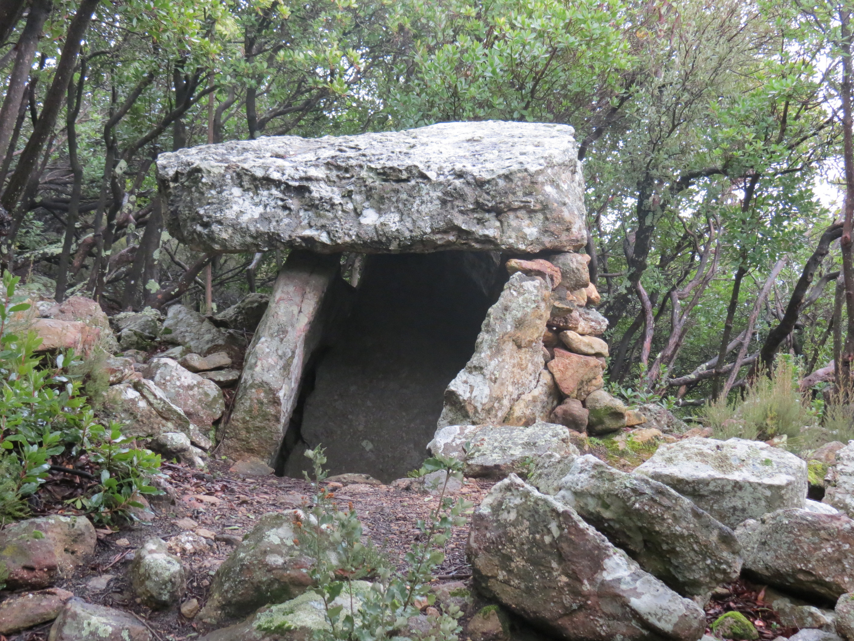 Dolmen de Trillol, Rouffiac-des-Corbières, Aude, Languedoc-Roussillon, France. - Google Maps - Google Earth